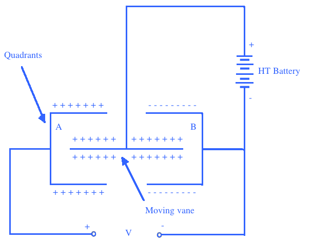 المروحة موجبة الشحن في الفولتمتر الكهروستاتيكي من النوع ذا الربع دائرة2